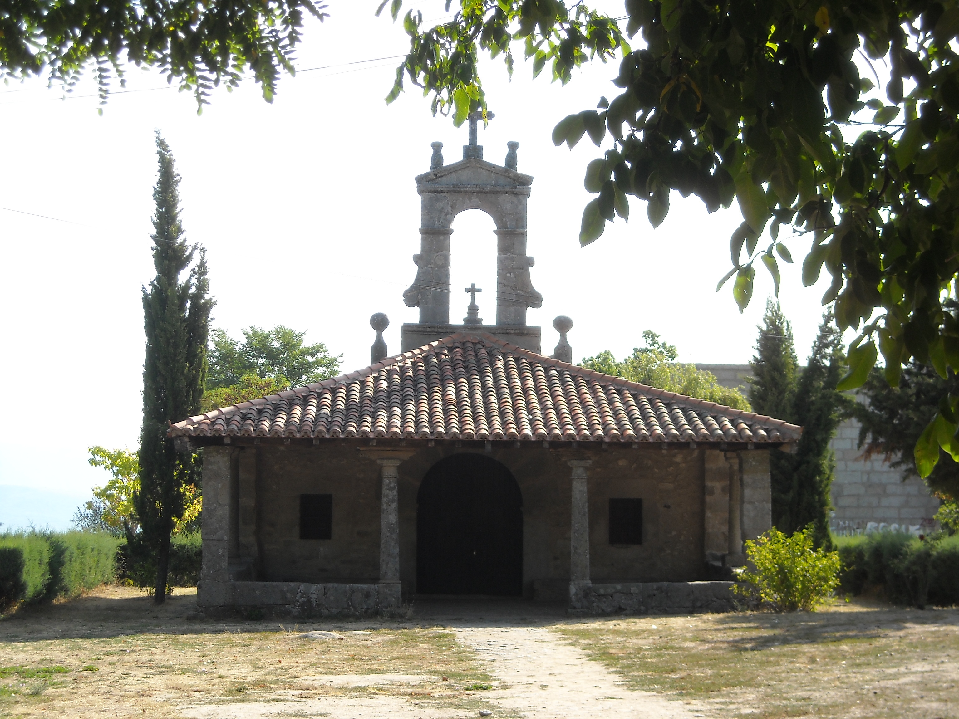 Ermita de San Blas, La Alberca, Salamanca, España